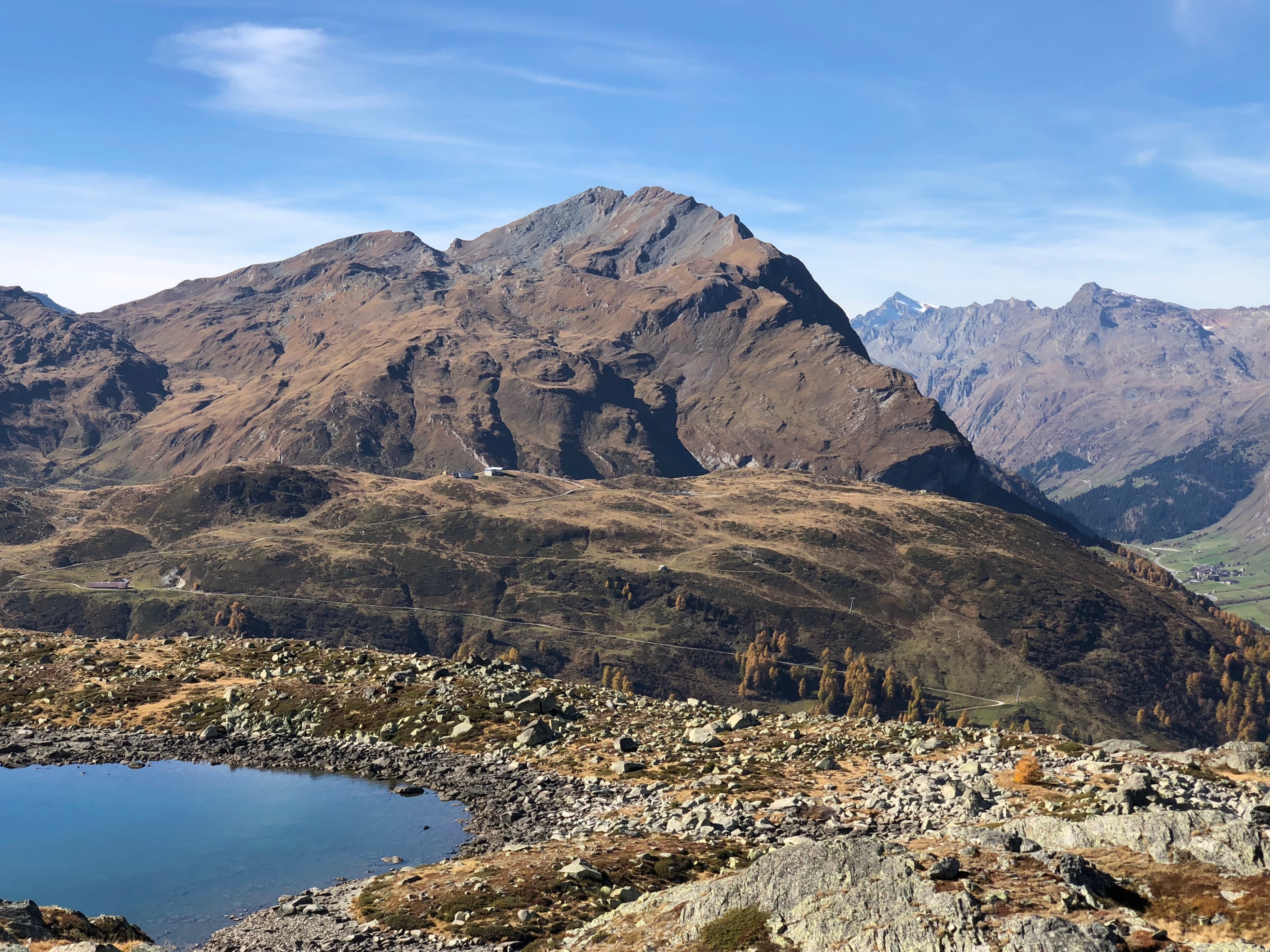 Guggernüll Guggernüll, under Surettasee